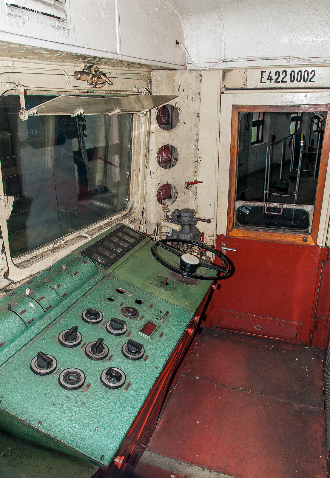 Stanoviště lokomotivy E422.0002 (100.002), uchovávané v depozitáři NTM v Chomutově.